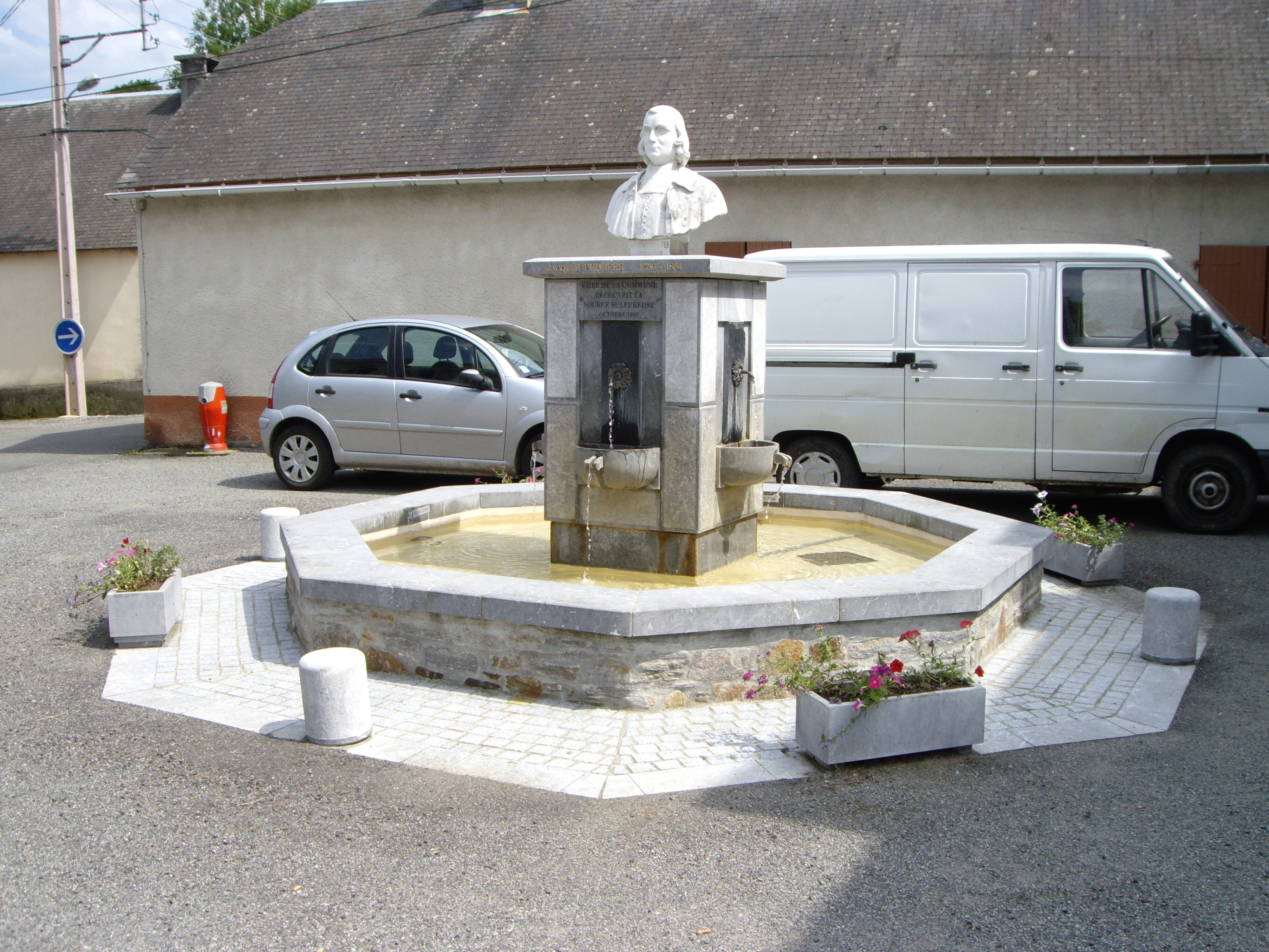 Buste de l'abbé Jacques Pédefer (Labassère, Hautes-Pyrénées, France)